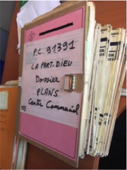 Archives du département du Rhône et de la métropole de Lyon, 3610 W 4.